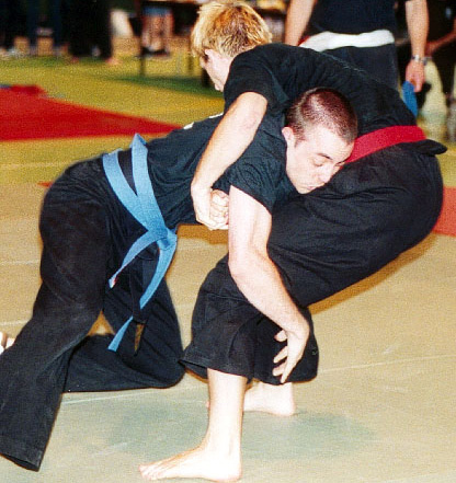 naban2005.jpg